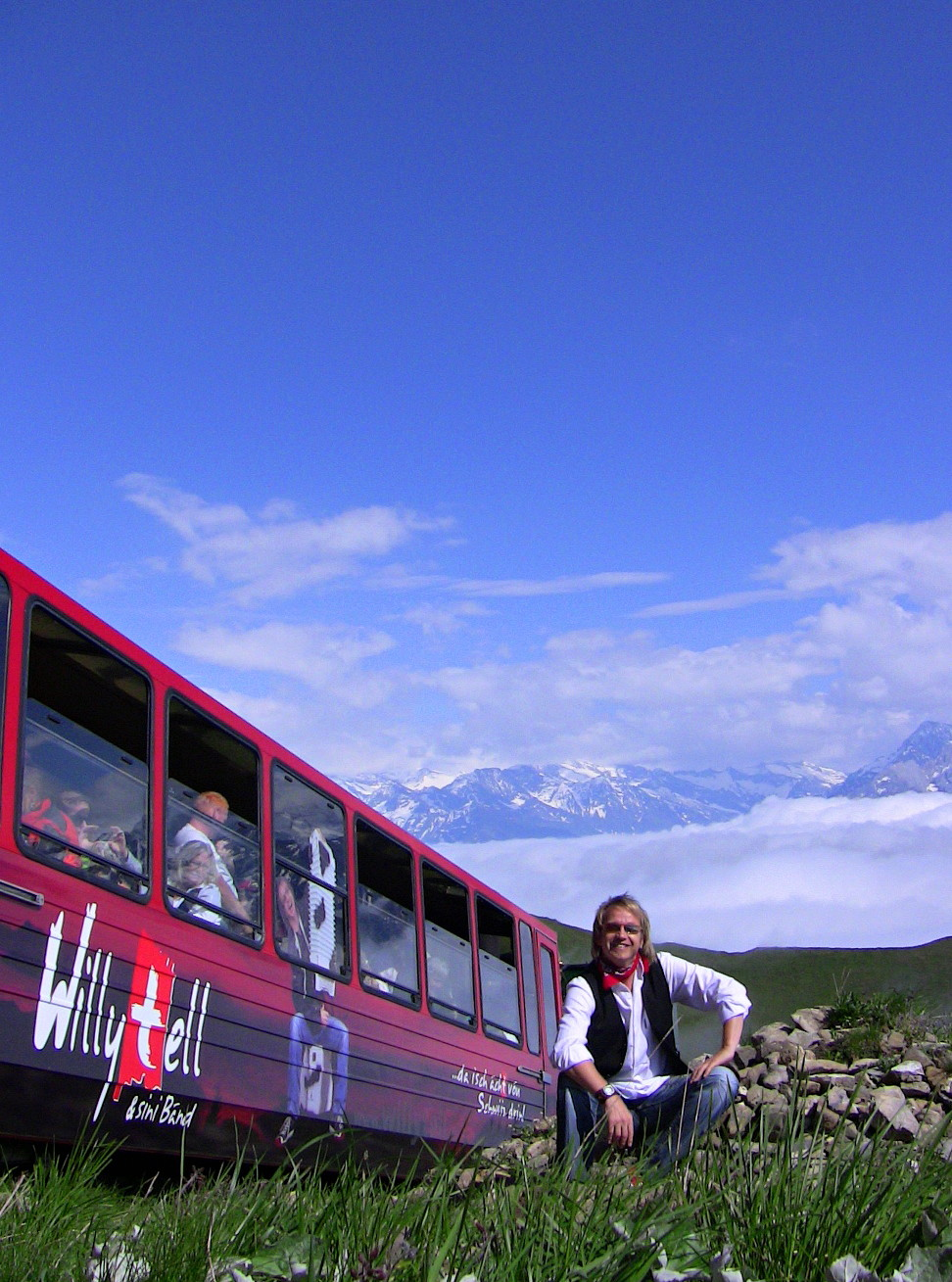 Der WillyTell Wagon und Willy Tell